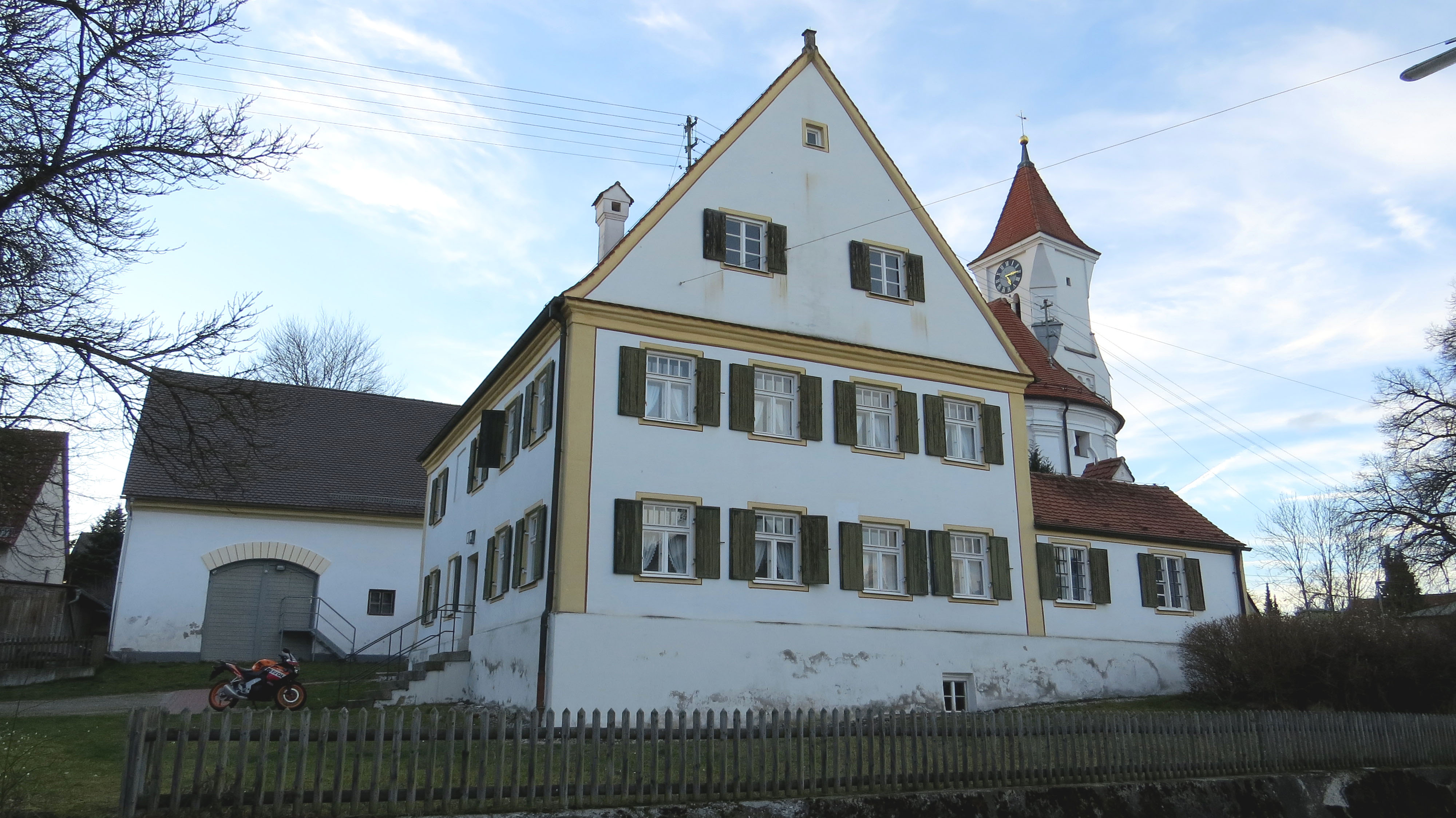 Pfarrhof in Scherstetten